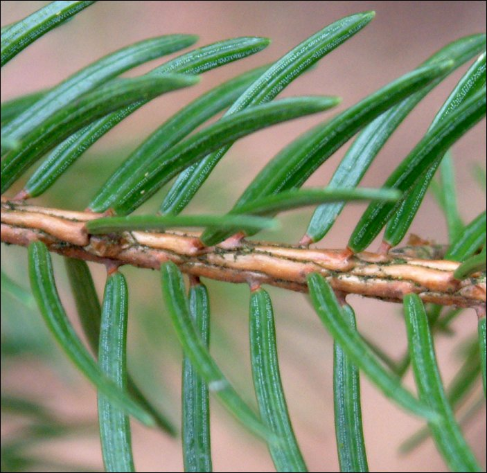 Fir-, pine- and spruce-needle in comparison -- Tannen-, Kiefern- und Fichtennadeln im Vergleich. This image: spruceneedle / Fichtennadel